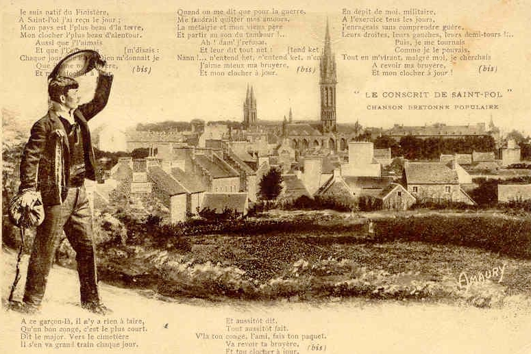 carte postale "Le conscrit de Saint-Pol", chanson populaire bretonne. Je suis natif du Finistère, A Saint-Pol j'ai reçu le jour. Mon pays est l'plus beau d'la terre, Mon clocher l'plus beau d'alentour. Aussi j' l'aimais, et j' l'admirais Chaque jours qu'Dieux me donnait j'me disais Que j'aime ma bruyère, Et mon clocher à jour. Quand on me dit que pour la guerre, Me faudrait quitter mes amours, La métairie et mon vieux père. Et partir au son des tambours... Ah ! Dam' J'refusais. Et leur dit tout net : Nam ! J'n'entends guet, n'entend ket ! J'aime mieux ma bruyère, Et mon clocher à jour.